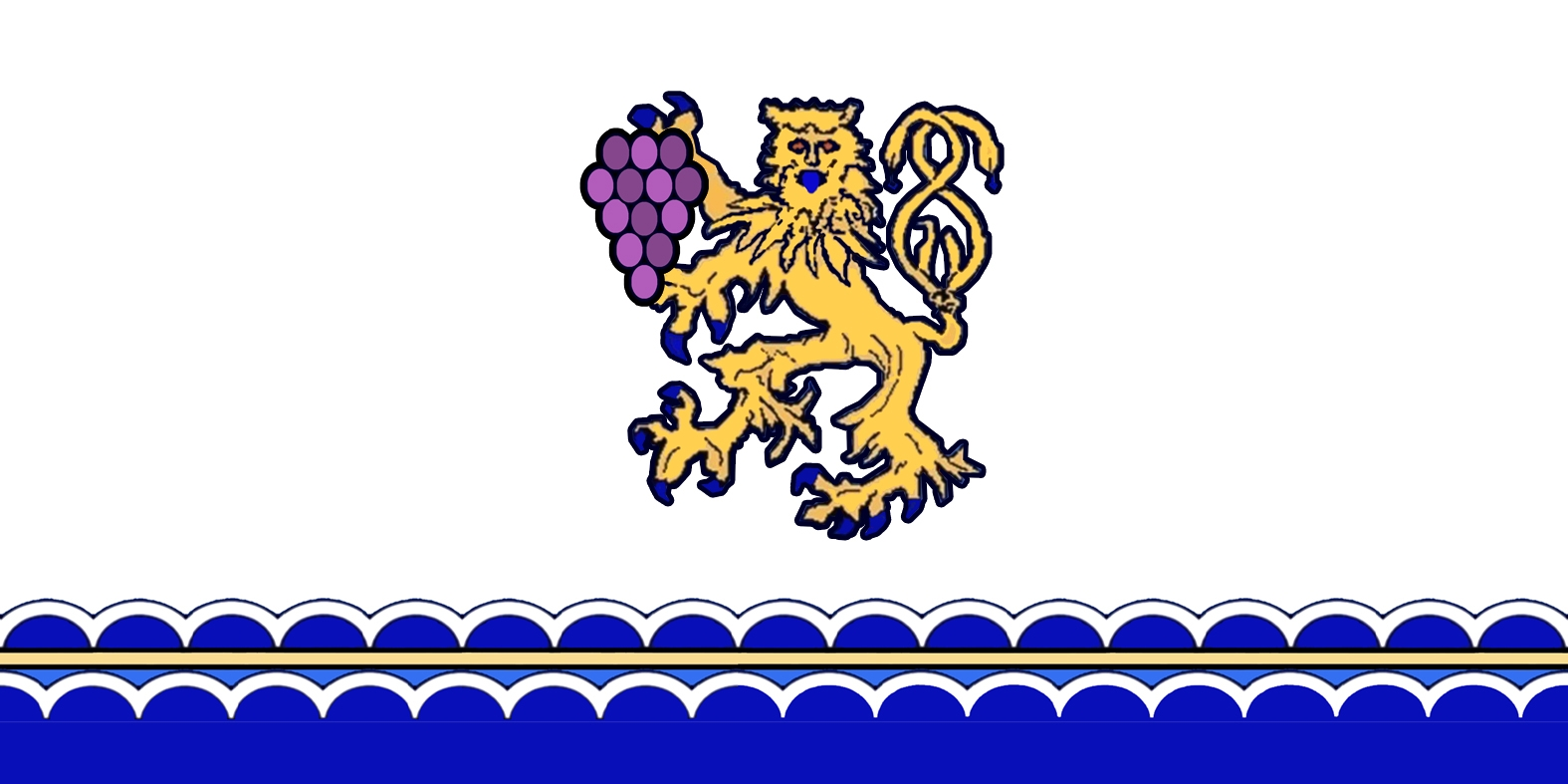 Flagge von Camenca